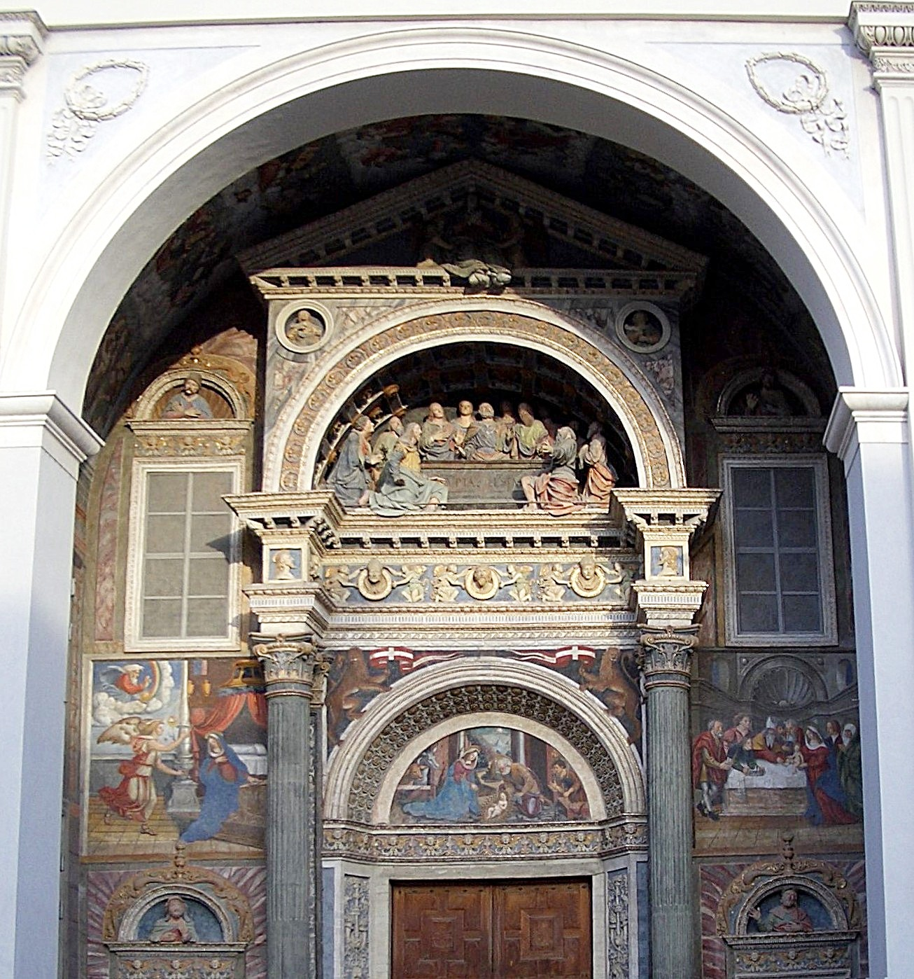 Aosta - Portale della Cattedrale